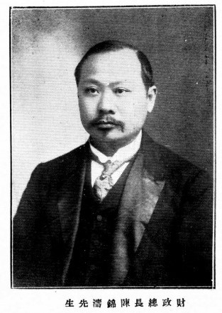 陳錦濤肖像